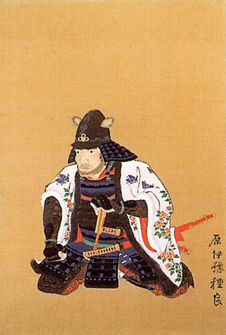 原種良の肖像。